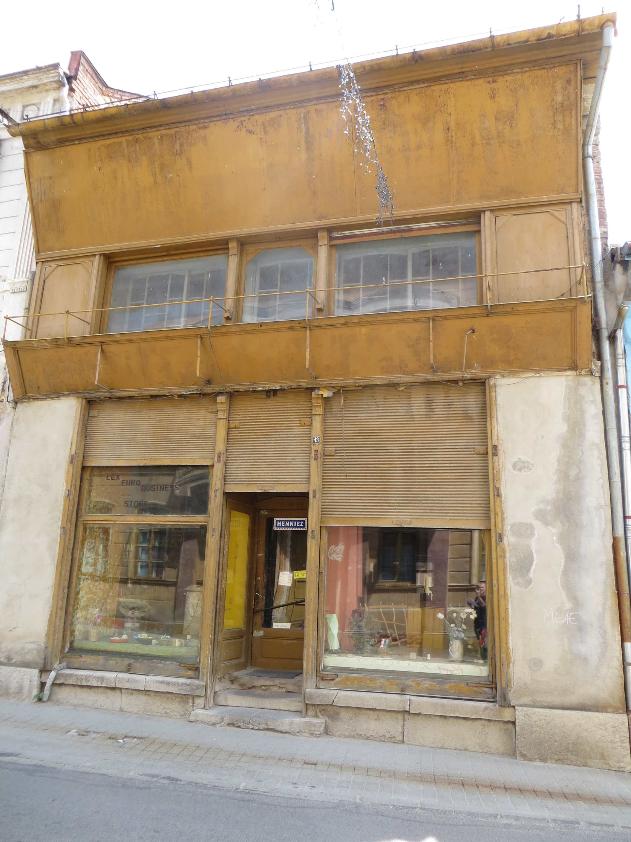 Magazin